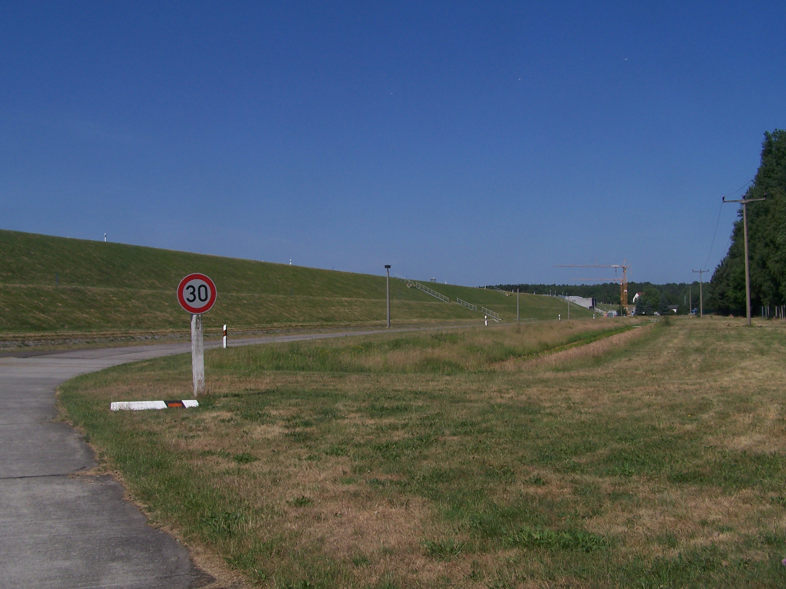 Staumauer der Talsperre Spremberg, Luftseite